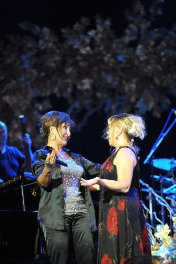 Cemil Topuzlu Açıkhava Tiyatrosu'ndan Nükhet Duru ve Sezen Aksu konserinden bir görünüm, 2012.